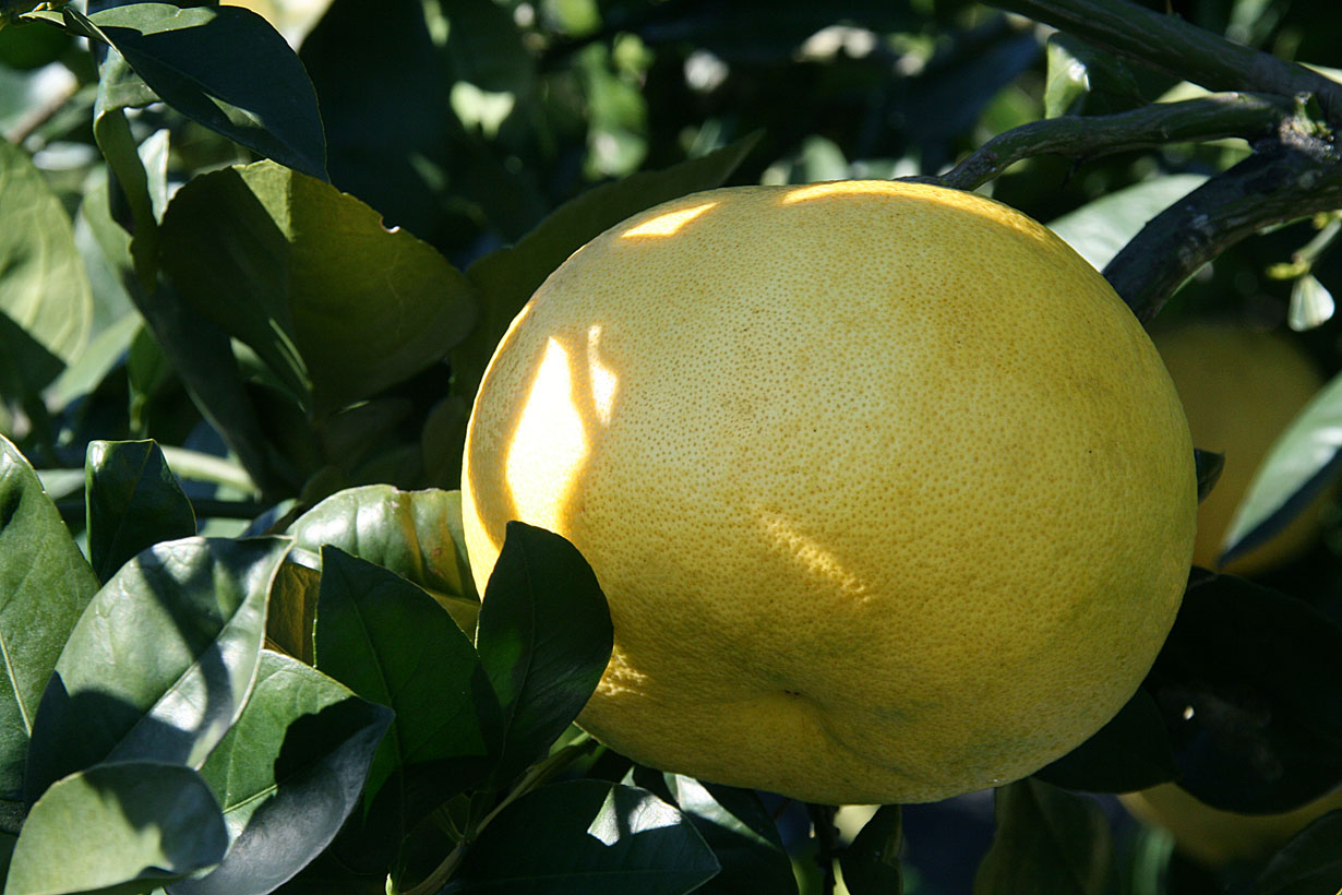 fruit de Mélogold sur l'arbre en fin janvier